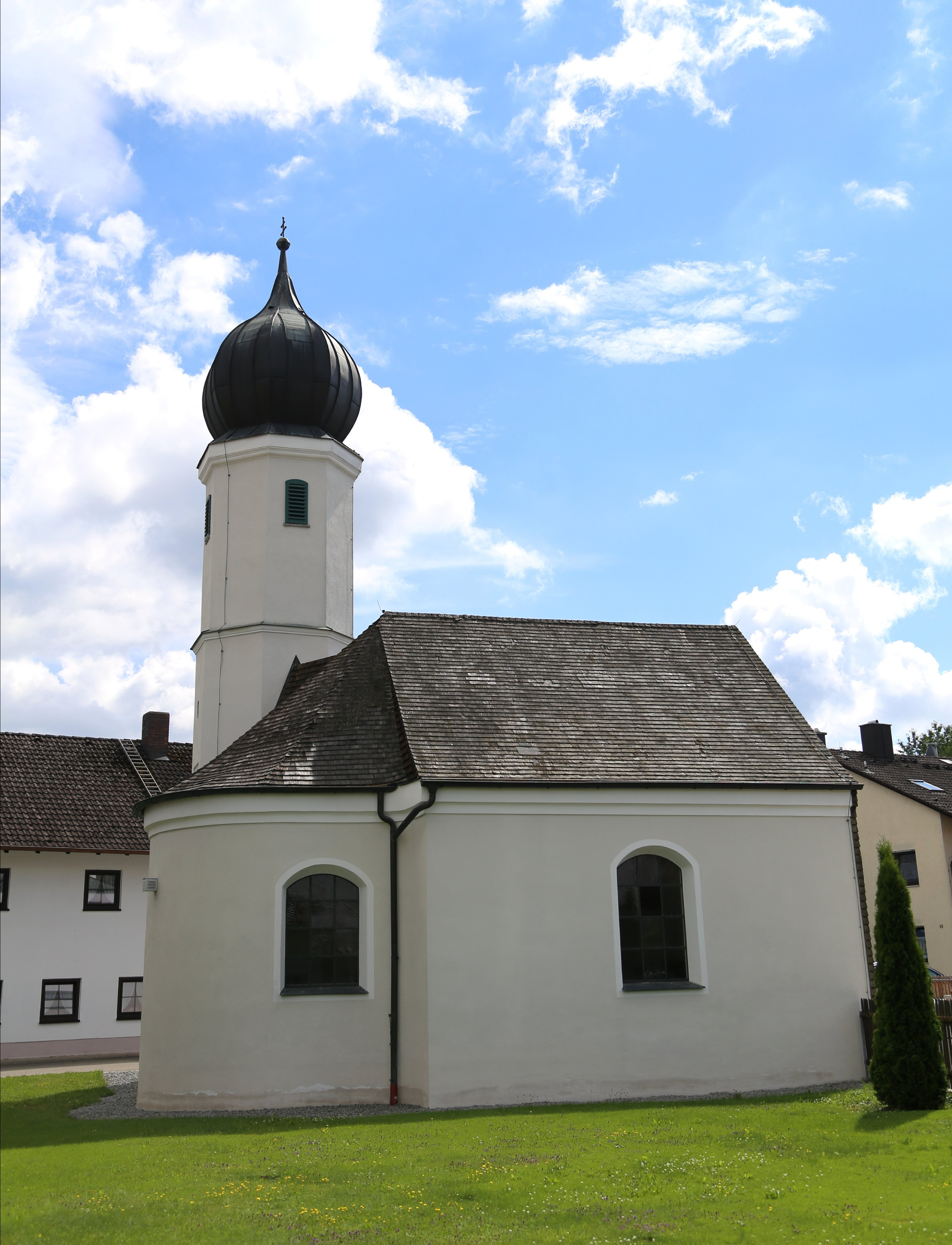 Wallfahrtskapelle (Liebfrauenkapelle), barock, um 1755/1759 neu erbaut, Zwiebelturm um 1797, Hofolding